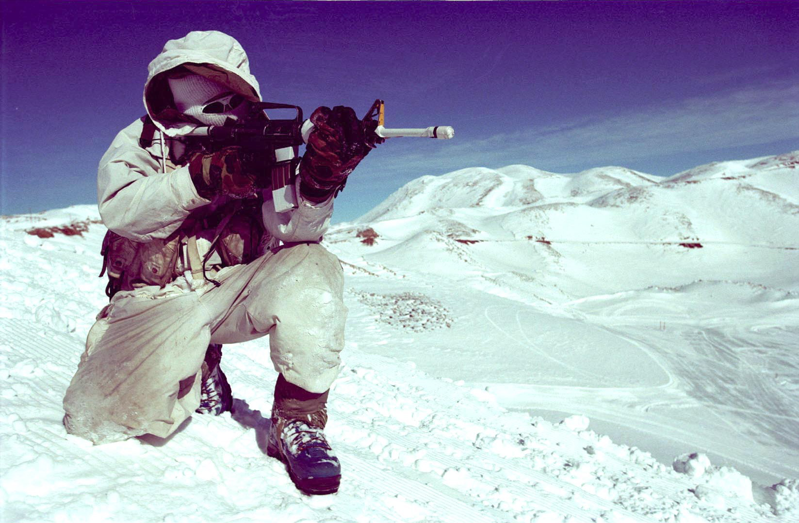 January 19, 2002. The elite Alpine Unit undergoes training in Mt. Hermon. The Alpine Unit is responsible for the protection of the Mt. Hermon region and its civilians. The unit takes part in clearing the snow paths to allow people to continue to operate under these difficult conditions. יחידת האלפיניסטים המובחרת בתקופת אימונים בחרמון. יחידת האלפיניסטים אחראית על הגנת גזרת החרמון ותושביה, והן עוזרת במאמץ פינוי השלג בכדי לאפשר מעבר חופשי ופעילות רציפה בתנאי מזג אוויר קשים.